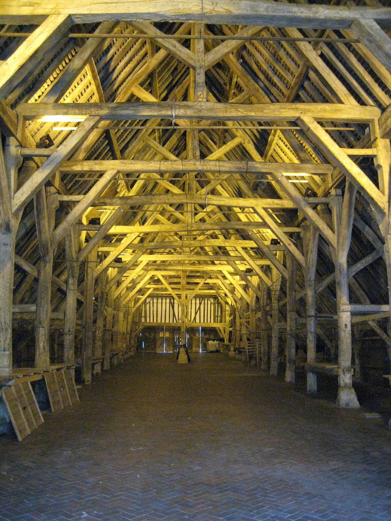 Halles de Dives-sur-Mer (Calvados), classées monument historique (CLMH, 03/01/1918)